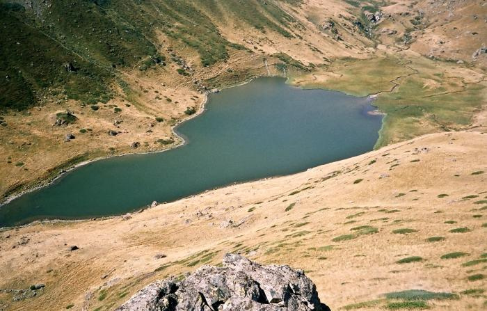 Боговинското Езеро на Шара